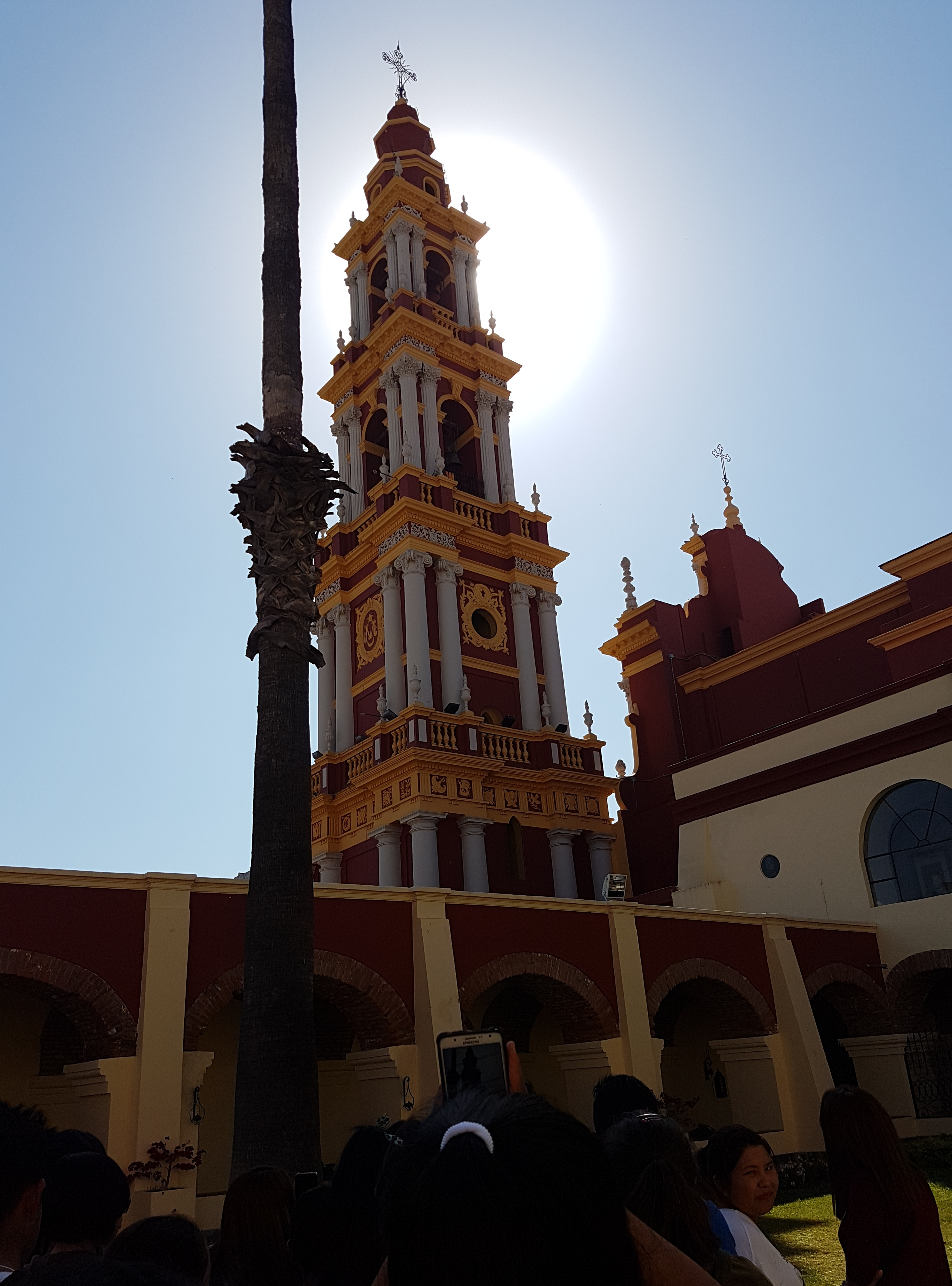 Basilica Menor San Francisco Salta